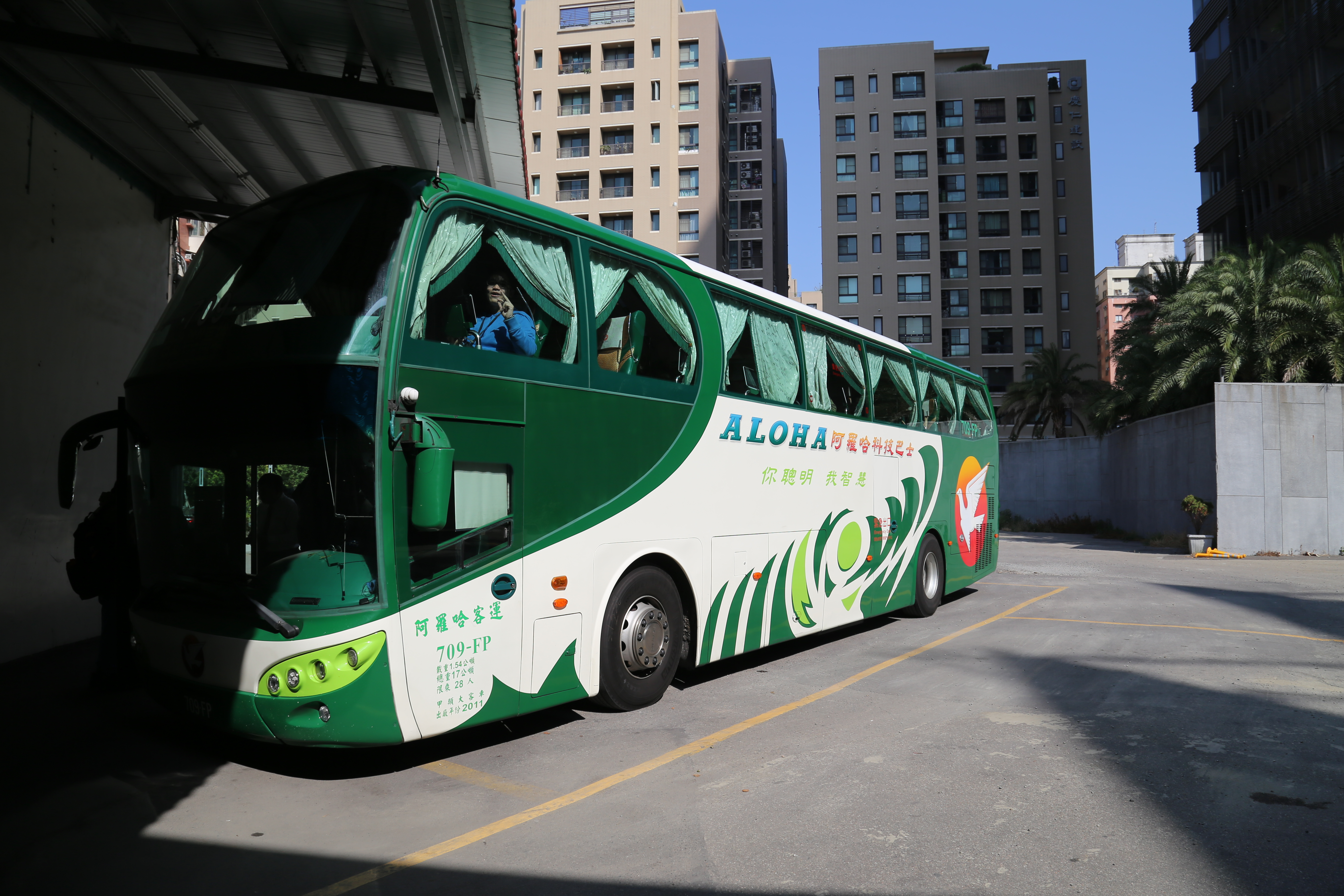 Aloha Bus SCANIA K380IB 709-FP in Taichung.